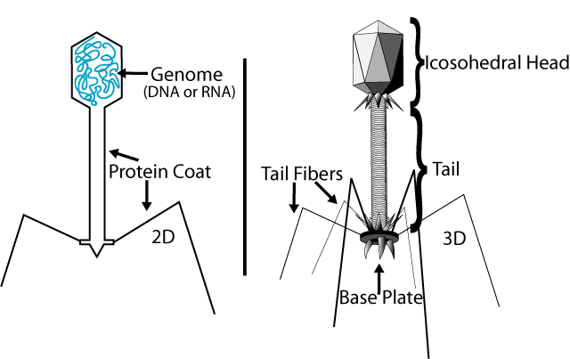 Bakteriofago baten diagrama.